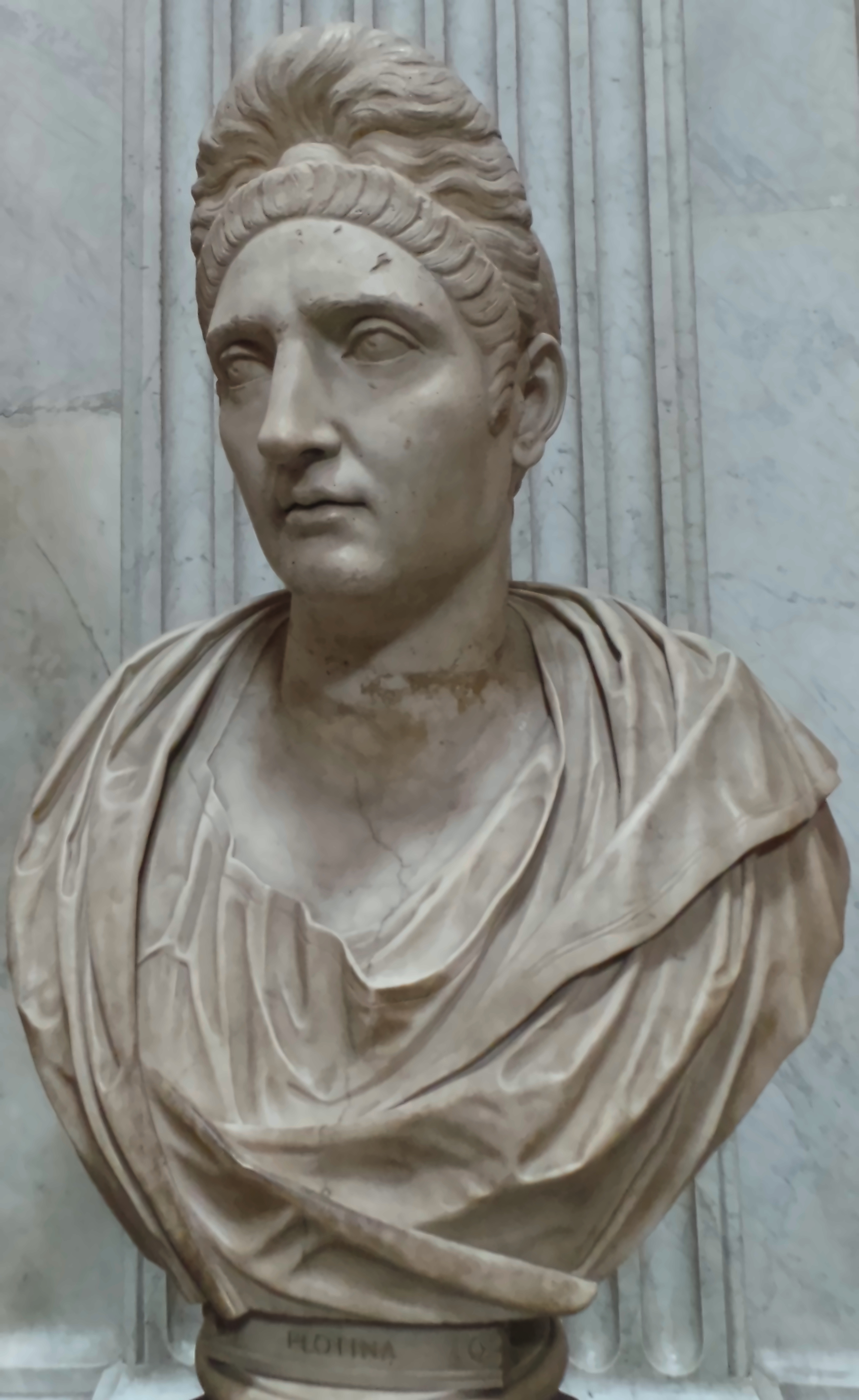 Die auf Münzen bekannten Gesichtszüge und die charakteristische Frisur mit hohem Toupet lassen darauf schließen, dass die um das Jahr 129 entstandene Büste die Plotina darstellt. In die vatikanischen Museen gelangte das Porträt um 1770.